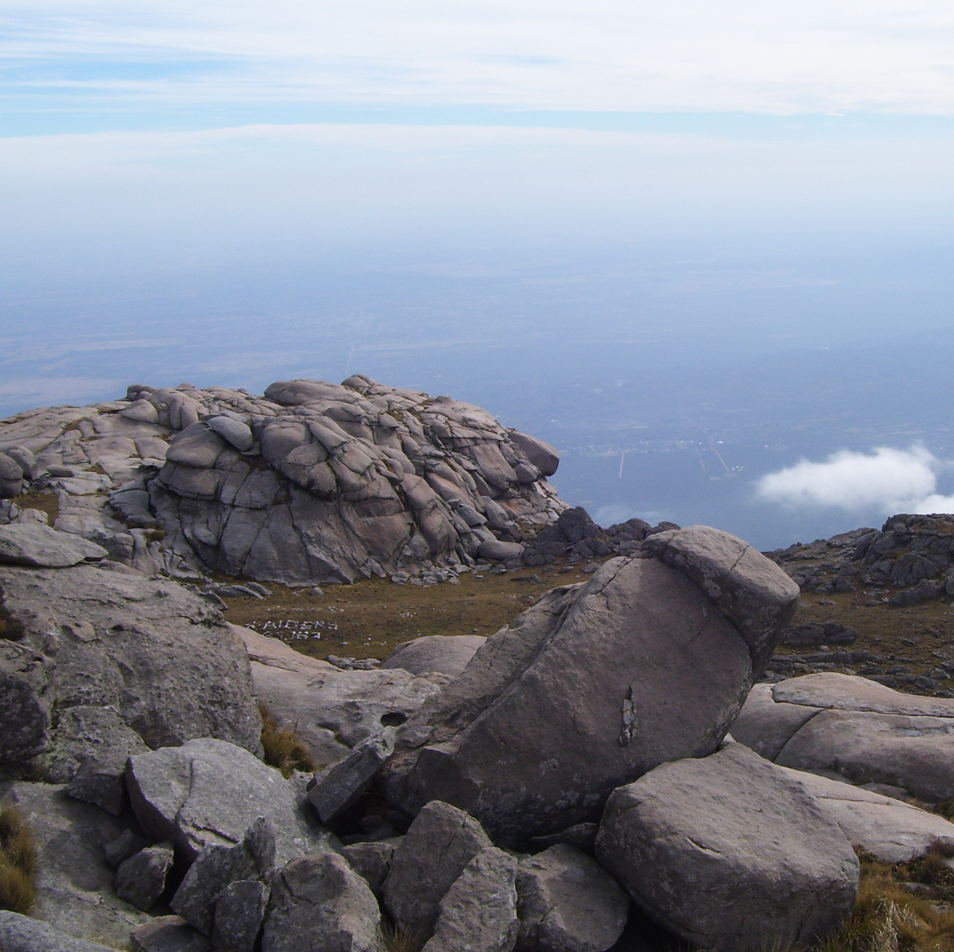 imagen tomada en la cima del cerro champaqui